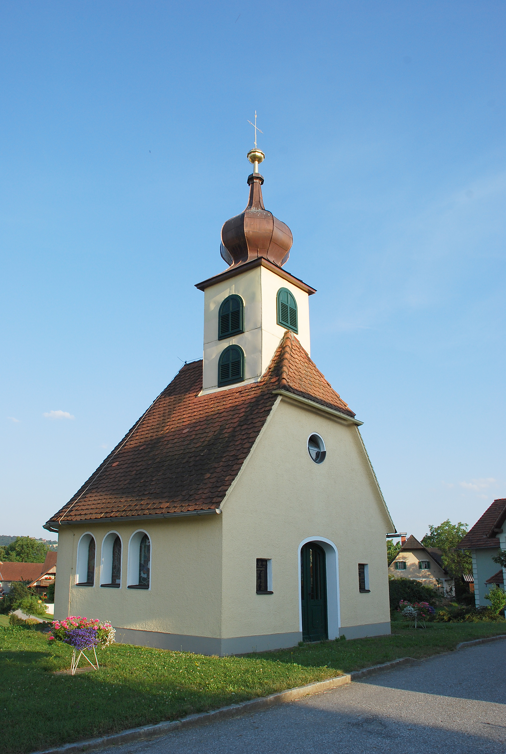 Wettmannstätten, Steiermark, Österreich: Ortskapelle Zehndorf